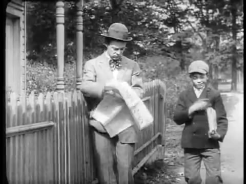 photo du film The Totville Eye (1912) avec sur la photo Harry Beaumont et Yale Boss.